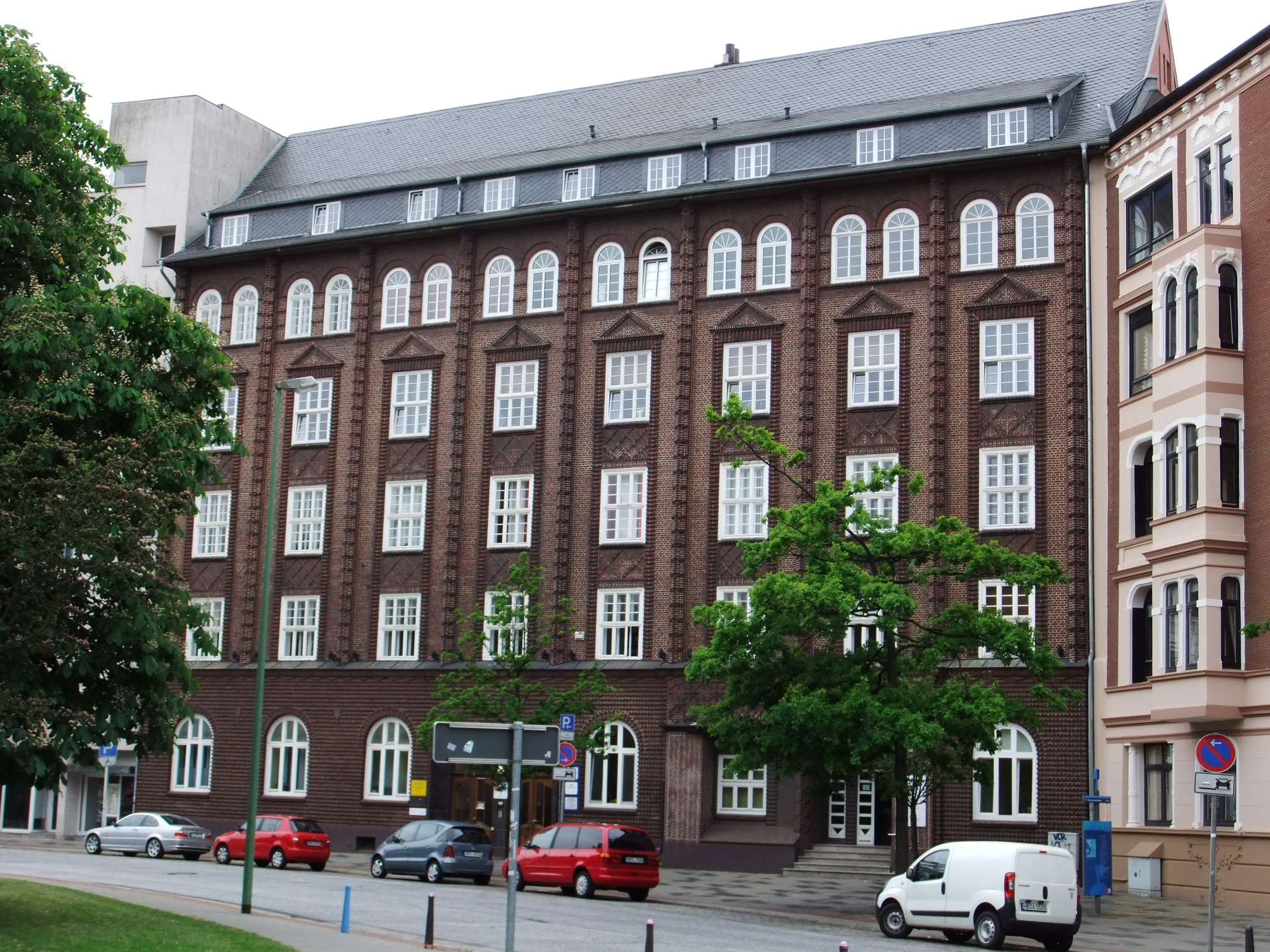 Allgemeine Ortskrankenkasse Bremerhaven in Bremerhaven, Bürgermeister-Smidt-Straße 162 .Das abgebildete Objekt ist ein geschütztes Kulturdenkmal in der Freien Hansestadt Bremen, mit der Nr. 1532 beim Landesamt für Denkmalpflege registriert.